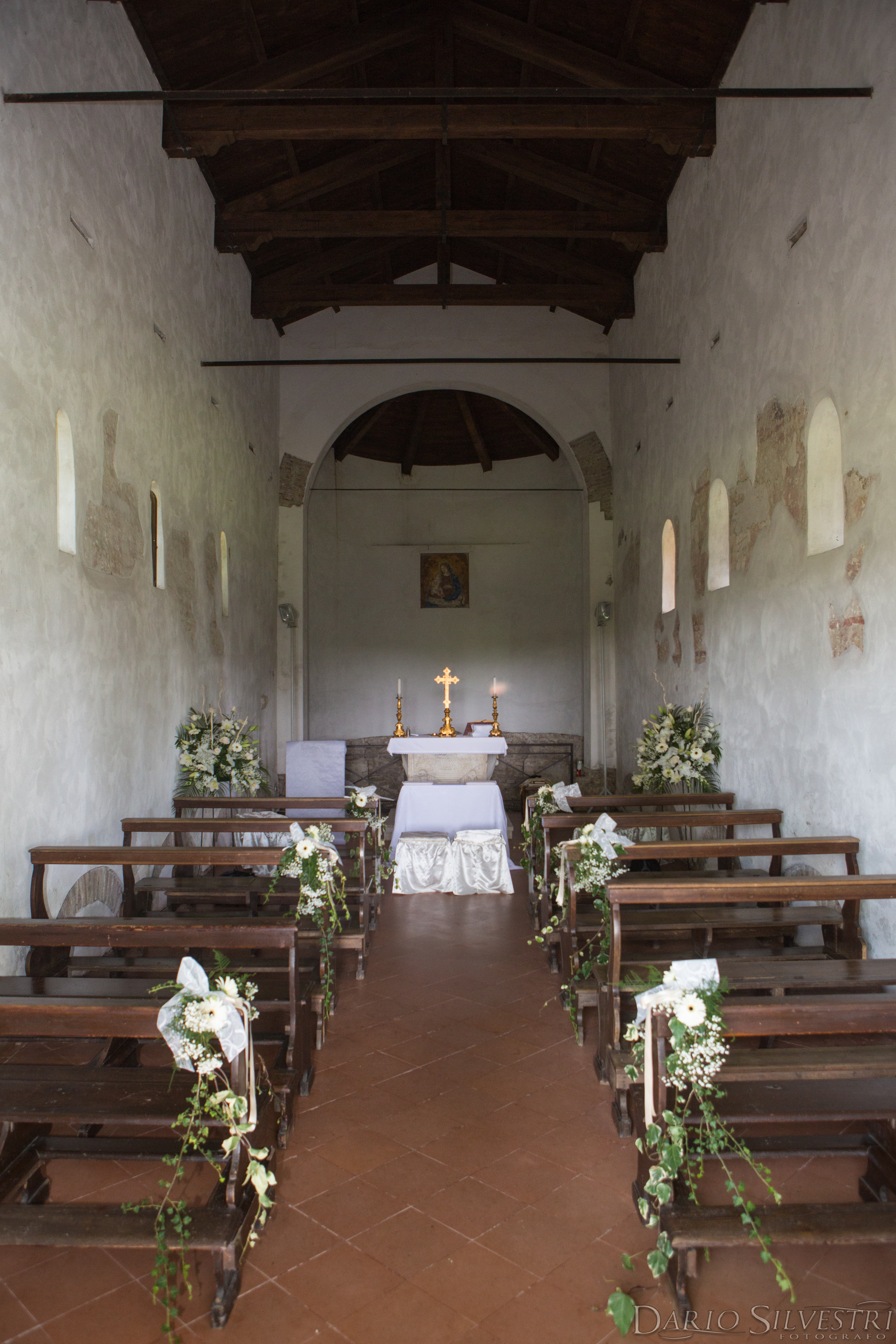 Una foto dell'interno della Pieve di San Giorgio ad Argenta (FE). non era disponibile nessuna altra immagine dell'interno, e durante un matrimonio ho rimediato alla mancanza!